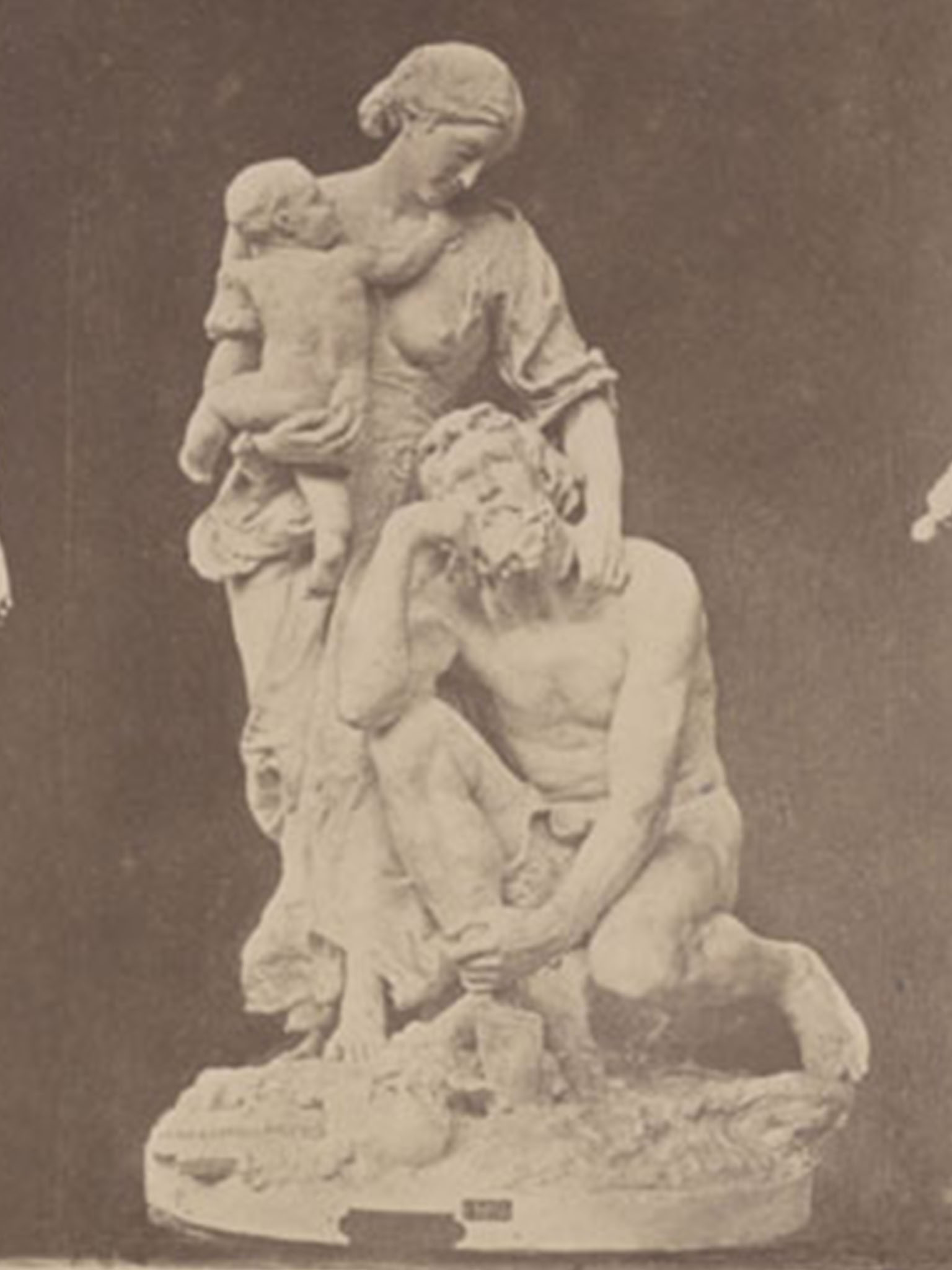 Jean-Alexandre Pézieux (1850-1898), Non omnes morimur, Salon de 1882, groupe en plâtre.